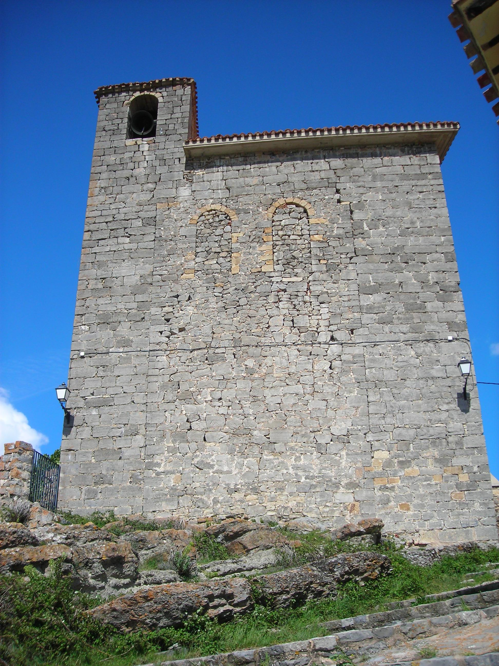 Iglesia de San Cristóbal desde la Calle Mayor